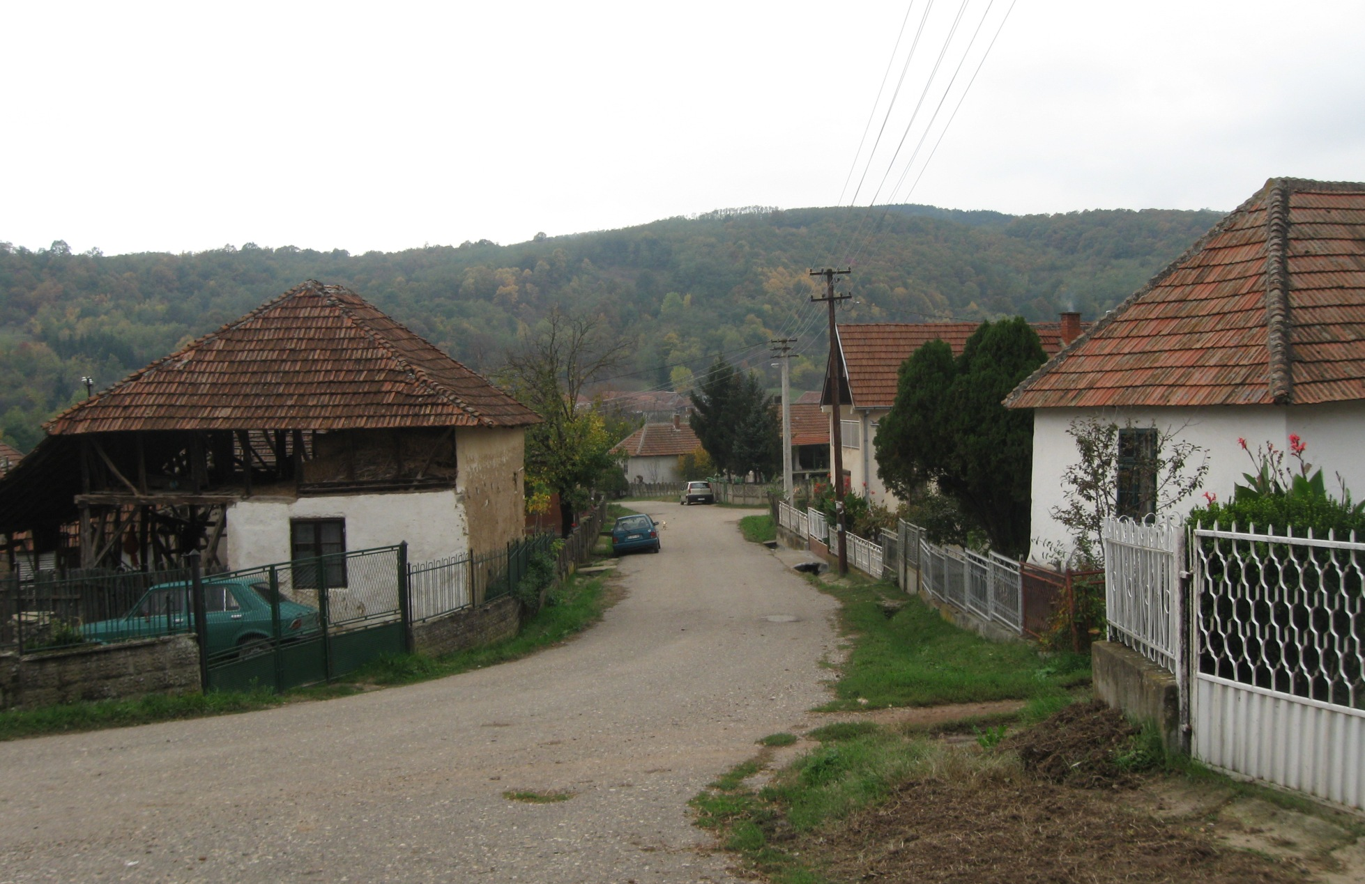 Послон (Ражањ)